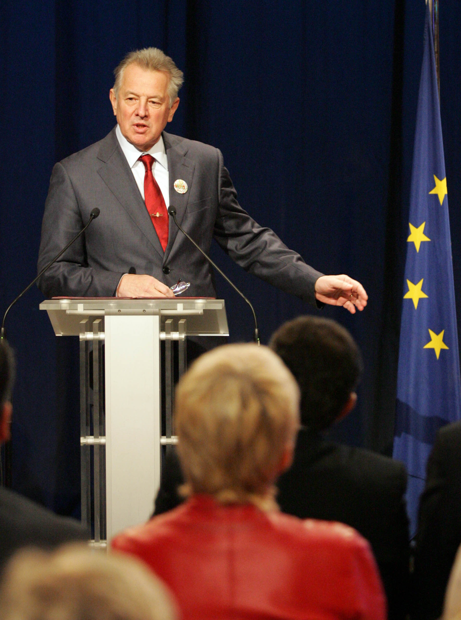 Budapest, 2011.01.08. Schmitt Pál a Magyar Köztársaság Elnöke beszédet tart az önkéntesség európai évének megnyitóján a Millenáris Teátrum épületében. Fotó: Európai Bizottság/Dudás Szabolcs